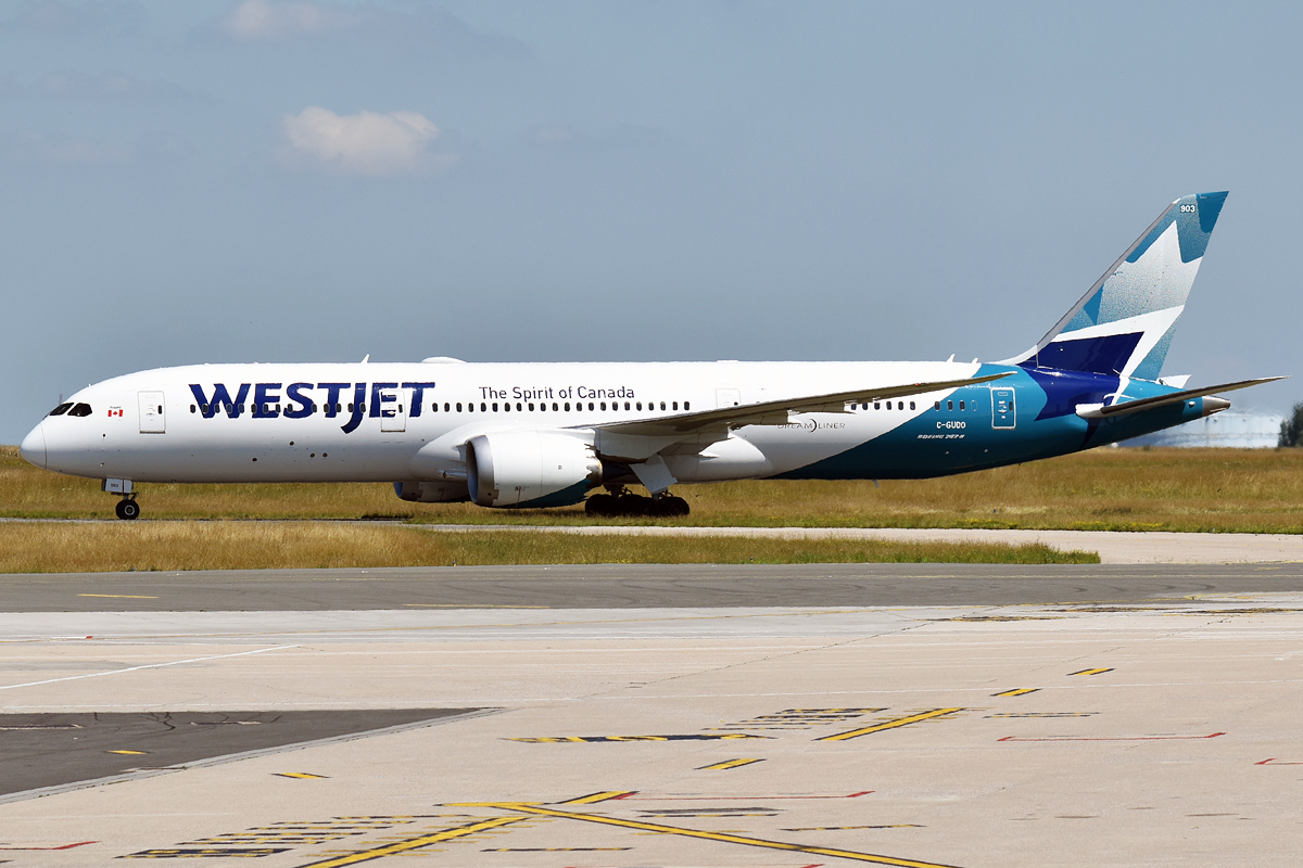 WestJet, C-GUDO, Boeing 787-9 Dreamliner